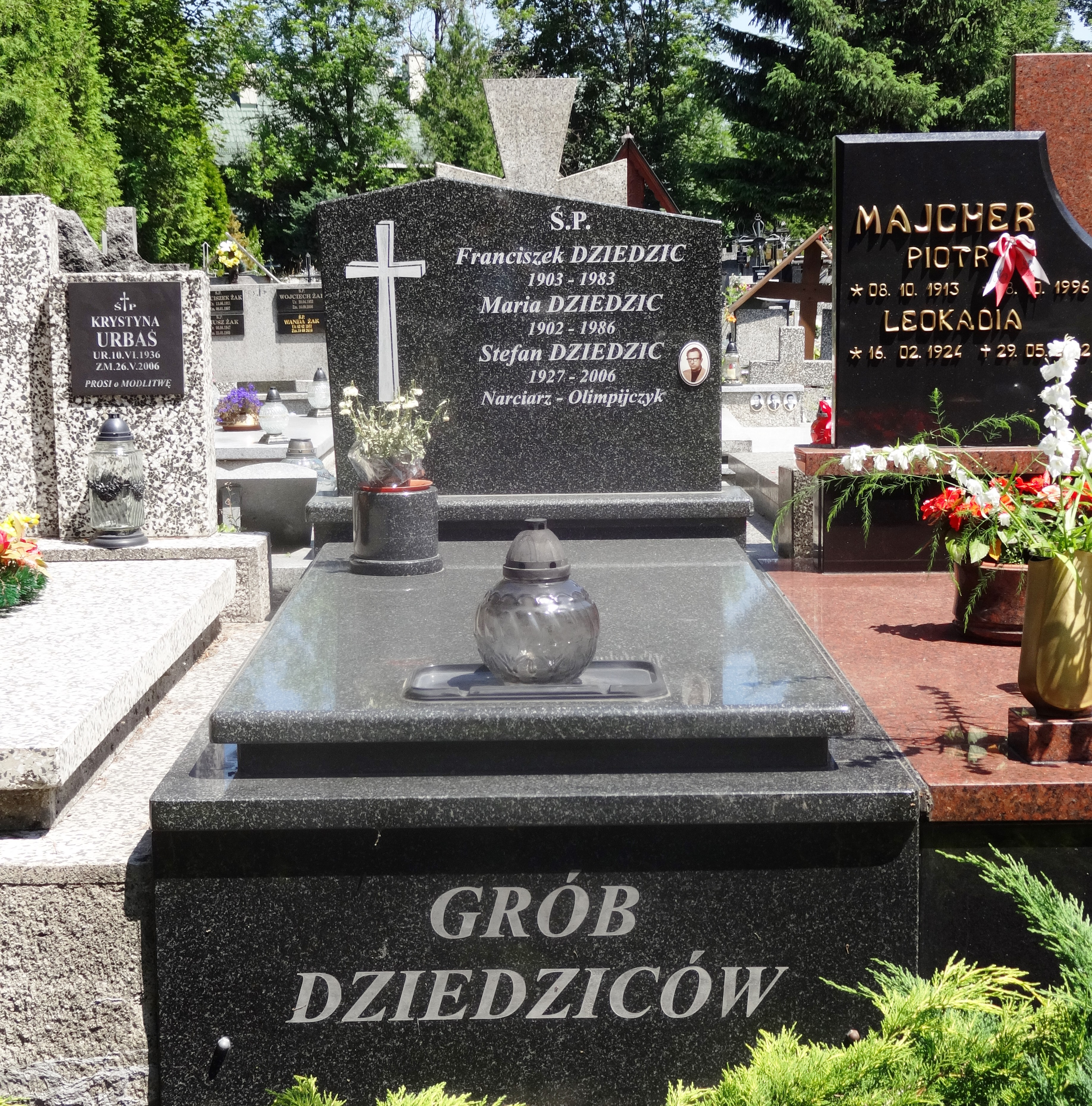 New Cemetery in Zakopane